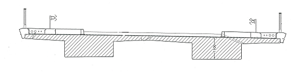 coupe transversale du tablier gières